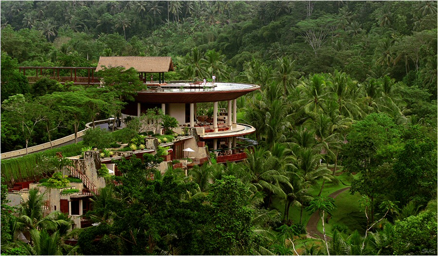 Urwald in der Nähe von Ubud. zu sehen ist das Hotel Four Seasons Resort Bali at Sayan (Ubud)